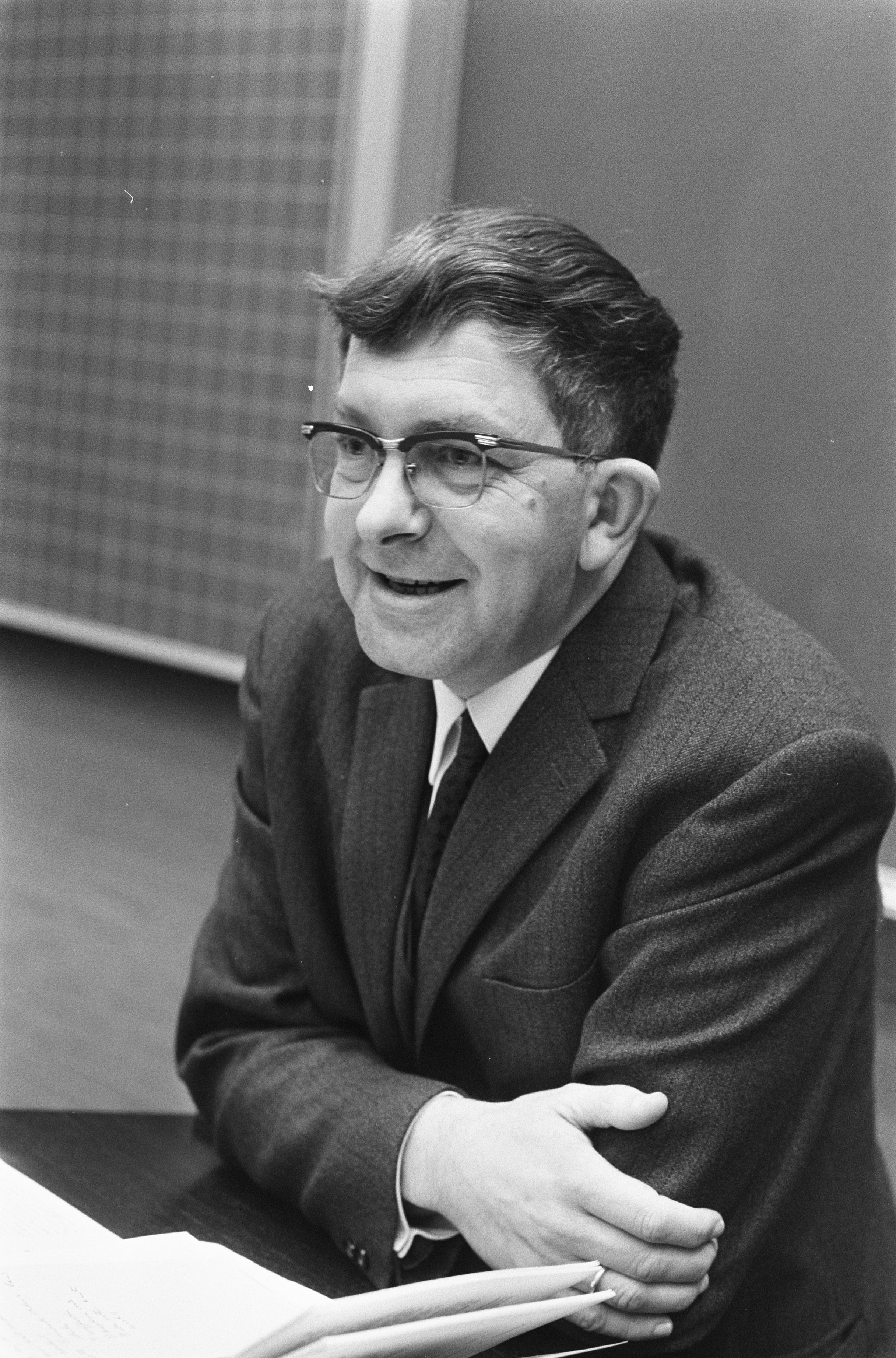 Cornelis Augustus (1928-2008). Professor dr. C. Augustijn sprak in gebouw Faculteit der Geneeskunde Vrije Universiteit Adam ter gelegenheid herdenking 5e geboorte-eeuwfeest van Erasmus